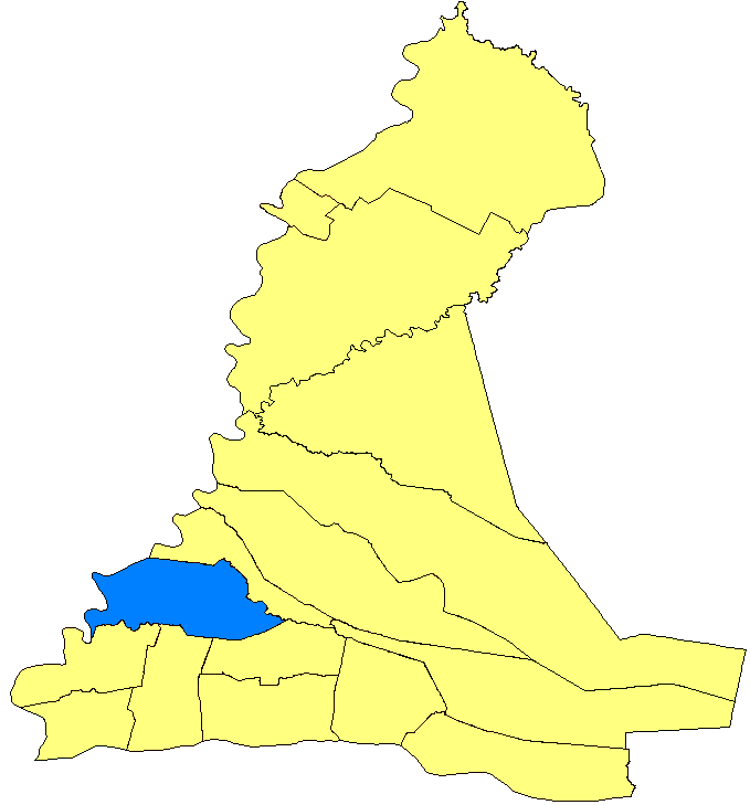 Mapa de Isla Umbú, Paraguay.